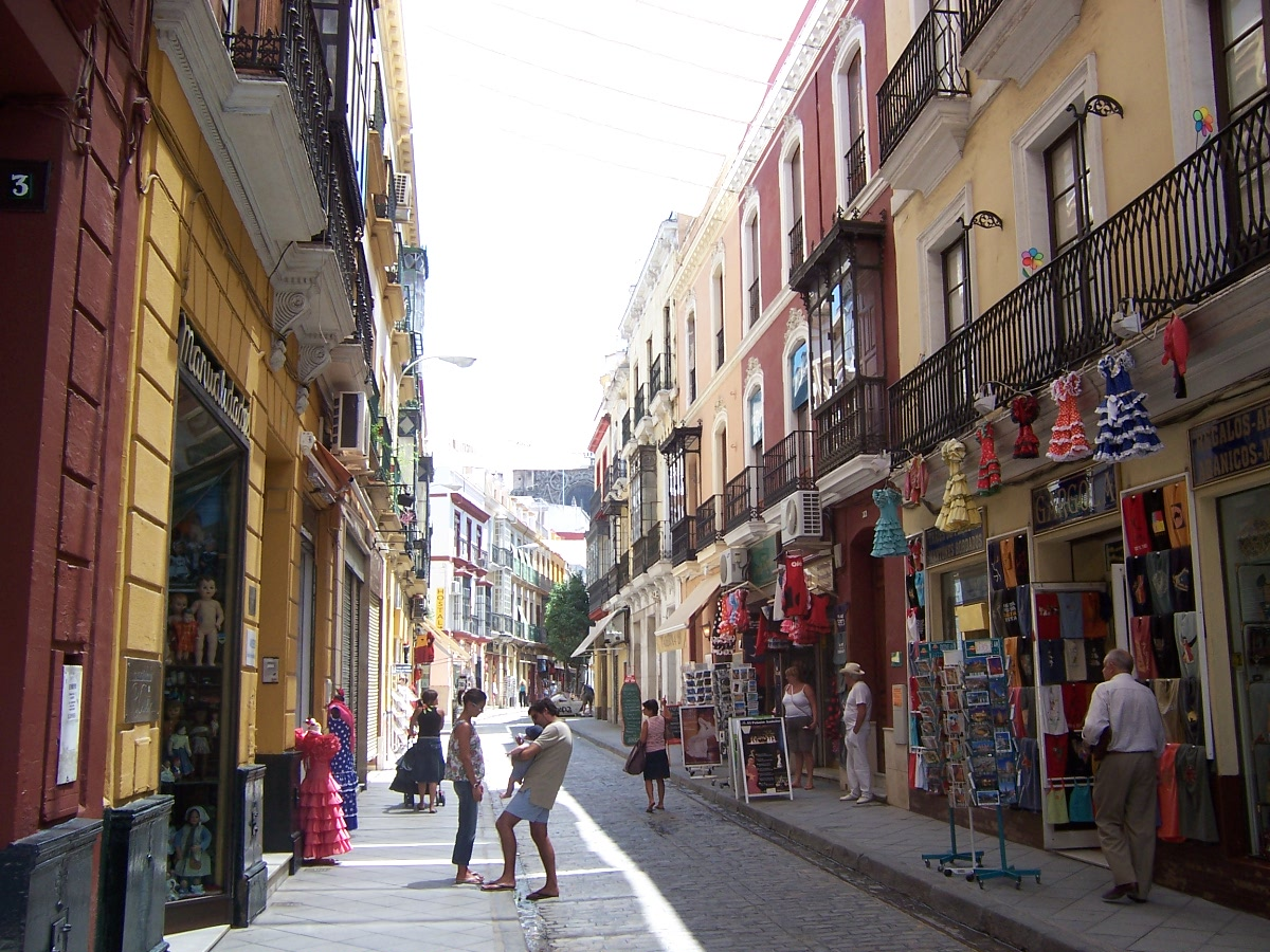 Calle Hernando Colón camera: Kodak DX7440 Source: *Daniel Csorfoly